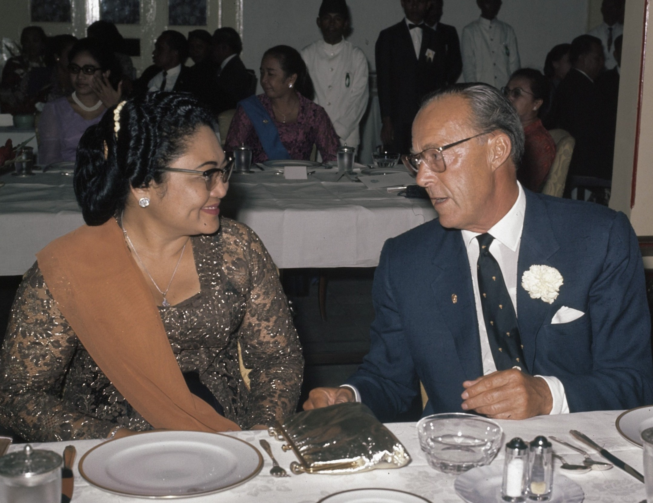 Prins Bernhard met mevrouw Soeharto aan de lunch in Yogyakarta